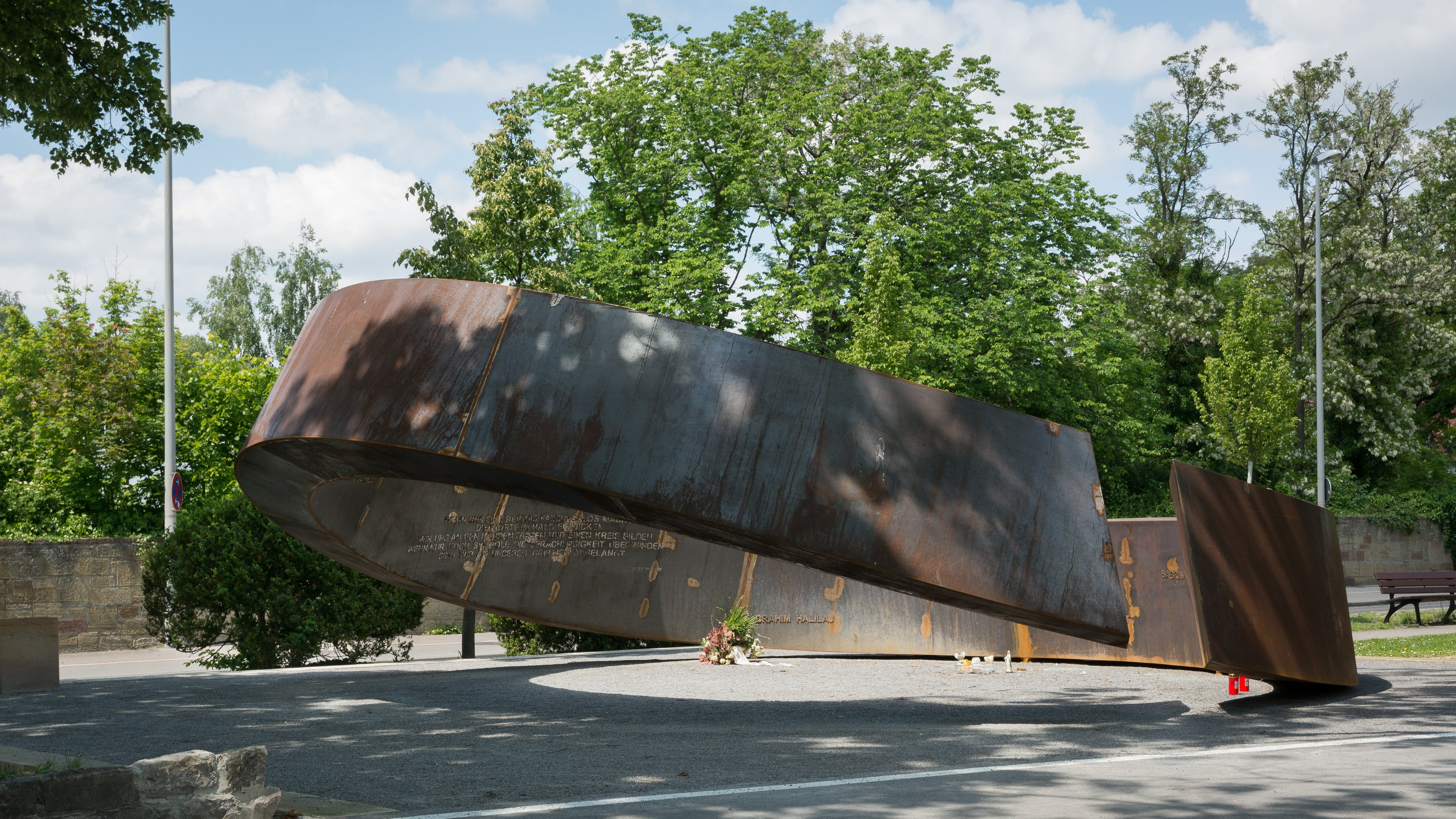 Martin Schöneich, Gebrochener Ring, Winnenden 2014 Inschrift an der Skulptur: Die Namen der 15 Getöteten und ein Gedicht von Josef Ritter Wenn uns ein Ereignis fassungslos macht die Worte im Hals ersticken wir uns an den Händen fassen und einen Kreis bilden wenn nur noch Symbole die Sprachlosigkeit überwinden sind wir an unseren Grenzen angelangt Auf einer Platte am Boden: Zum Gedenken an fünfzehn Menschen, die am 11. März 2009 Opfer einer schrecklichen Tat in Winnenden und Wendlingen wurden. Ein 17-jJähriger ermordete an seiner früheren Schule, der Albertville-Realschule Winnenden, neun Schülerinnen und Schüler und drei Lehrerinnen. Auf der Flucht tötete er einen Mitarbeiter des benachbarten Klinikums und zwei Menschen in Wendlingen. Darüber hinaus wurden von ihm weitere Menschen an Körper und Seele verletzt. Er richtete sich schließlich selbst. Diese Gedenkstätte lädt uns ein zum Innehalten, zum Aushalten von Trauer und Verlust und zum Gedenken an die Opfer. Gleichzeitig will sie uns Hoffnung für eine bessere Welt machen. Der Ring symbolisiert Zusammengehörigkeit und Vollkommenheit. Der „Gebrochene Ring“ steht dafür, dass die grausame Tat Menschen von uns weggerissen hat. Der „Gebrochene Ring“ bäumt sich aber gegen diese Gewalt auf. Er warnt uns so vor Wiederholungen und drückt zugleich unsere Hoffnung auf eine friedlichere Zukunft aus. Idee und Realisierung: Bildhauer Martin Schöneich